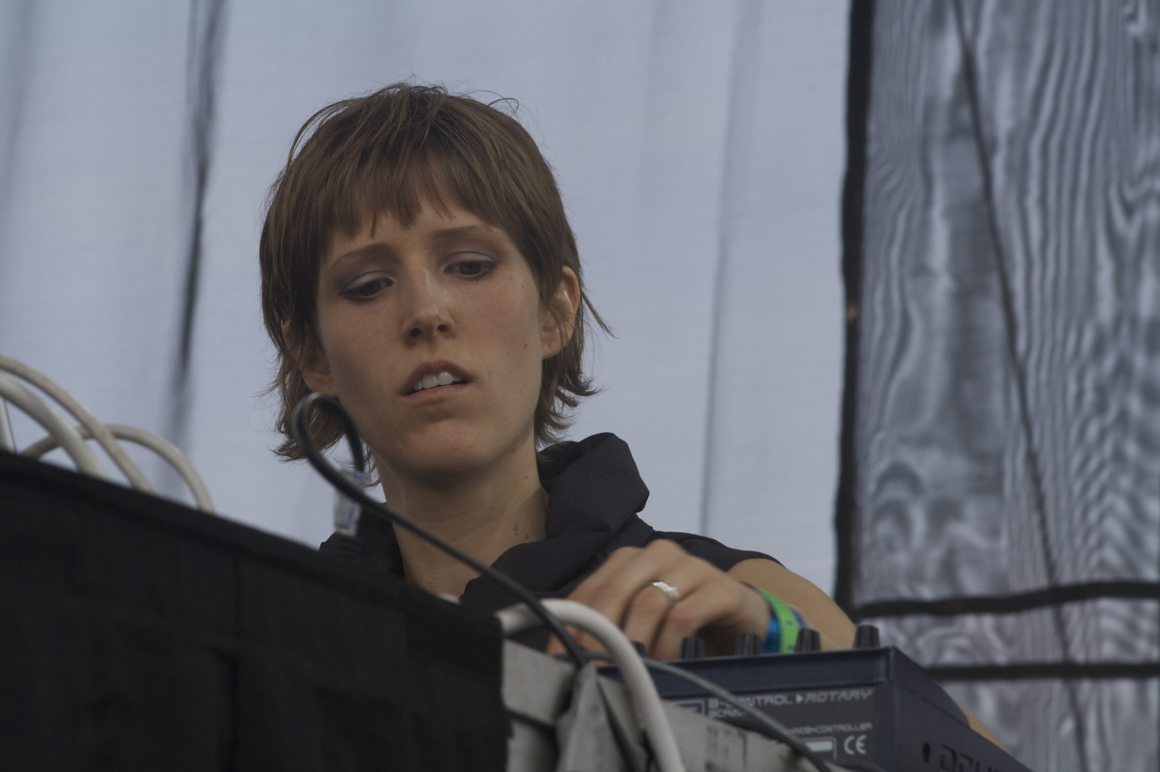 Kate Simko, Pyramid Stage